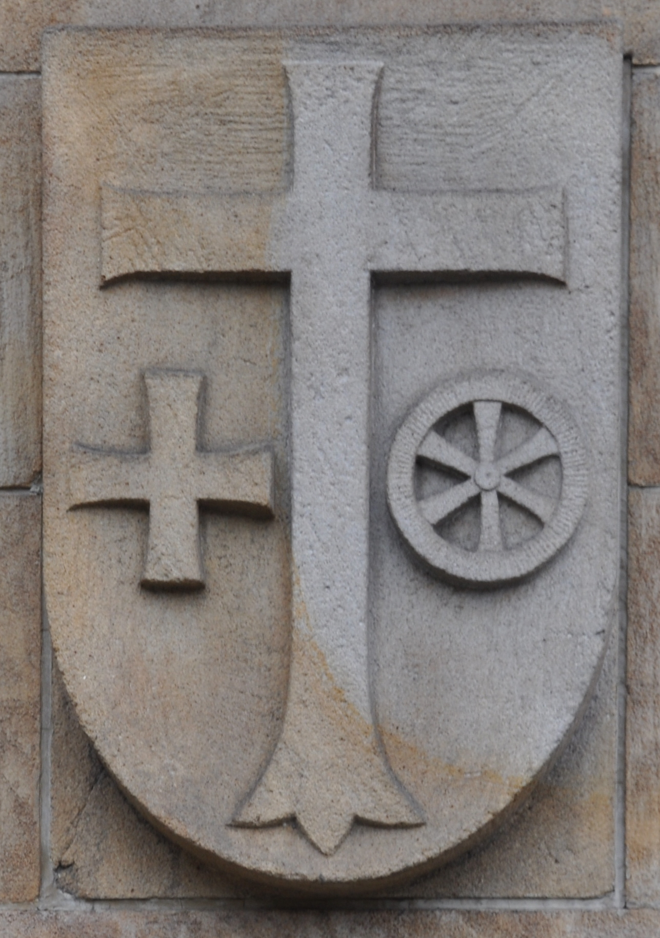 Mainz, Münsterplatz, Sparkasse Mainz (Wappenreliefs an der Fassade), Wappen Weisenau